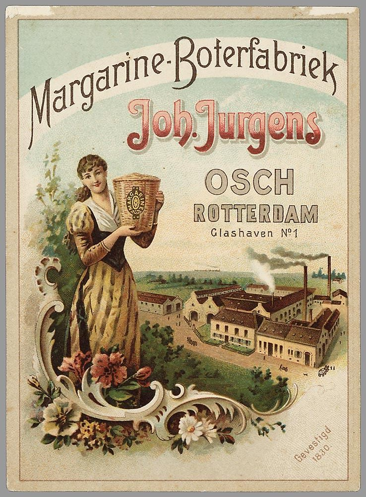 Prijslijst: Margarine-Boterfabriek Joh. Jurgens, Osch, Rotterdam.